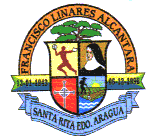 Escudo del Municipio Francisco Linares Alcántara